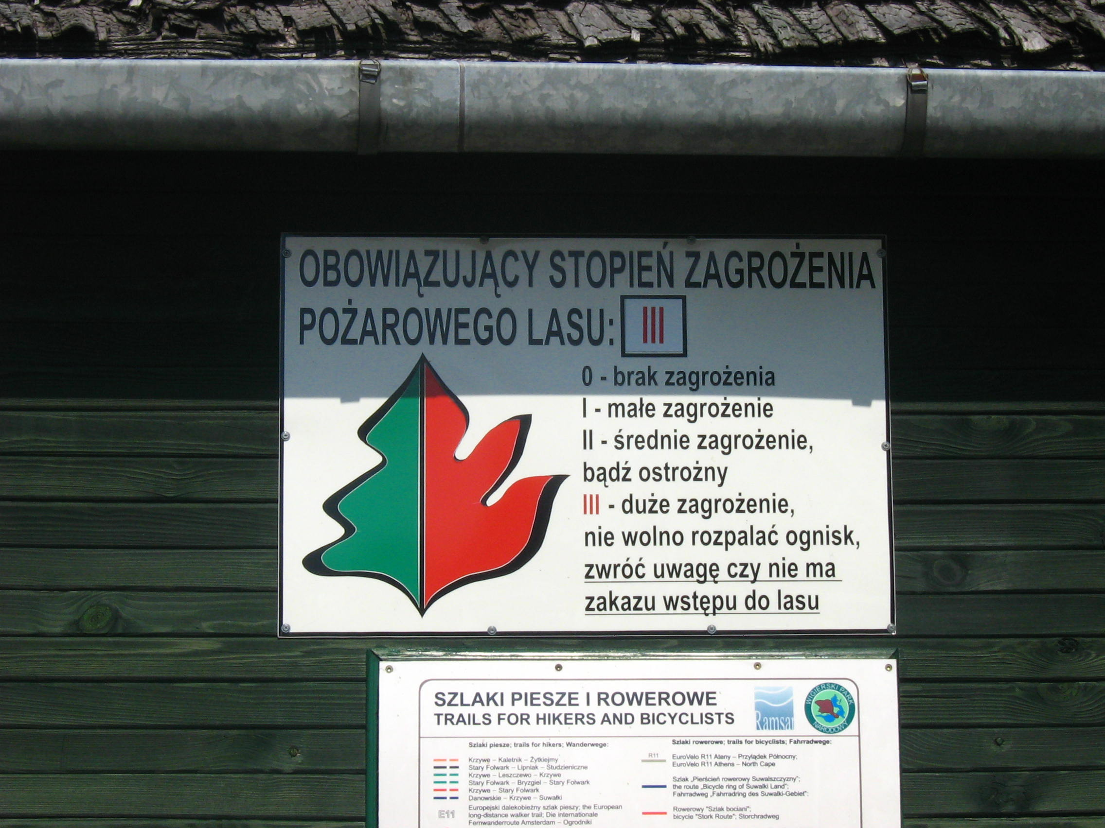 Tablica przy siedzibie Wigierskiego Parku Narodowego informująca o stopniu zagrożenia pożarowego.